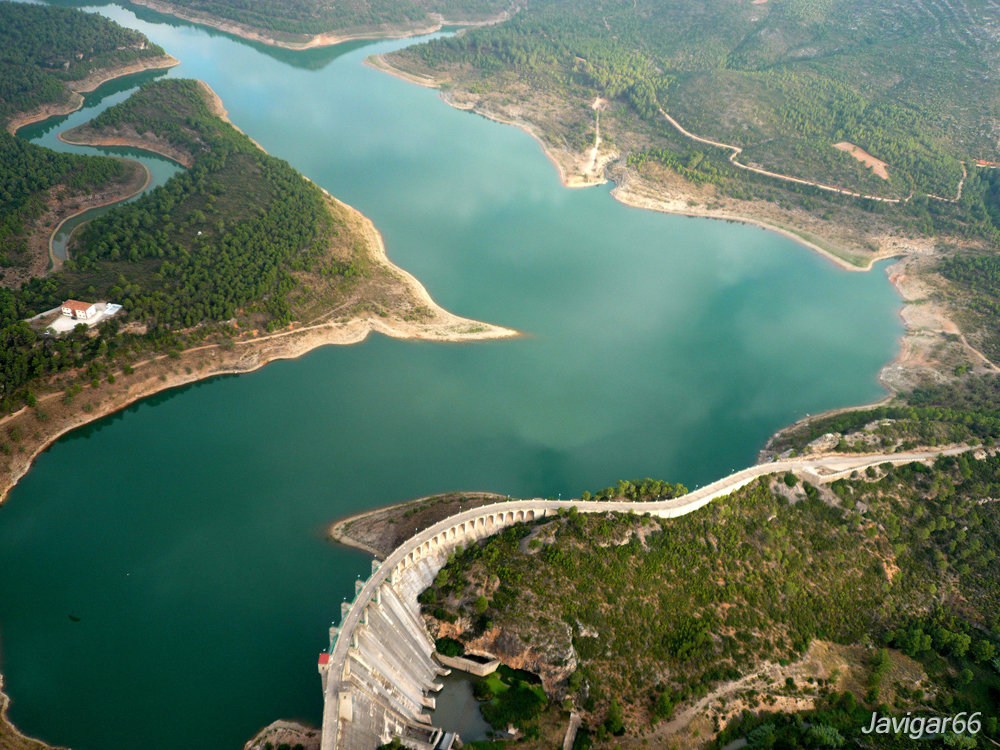 El embalse se encuentra en Yátova, provincia de Valencia, España. Recoge las aguas del río Magro.